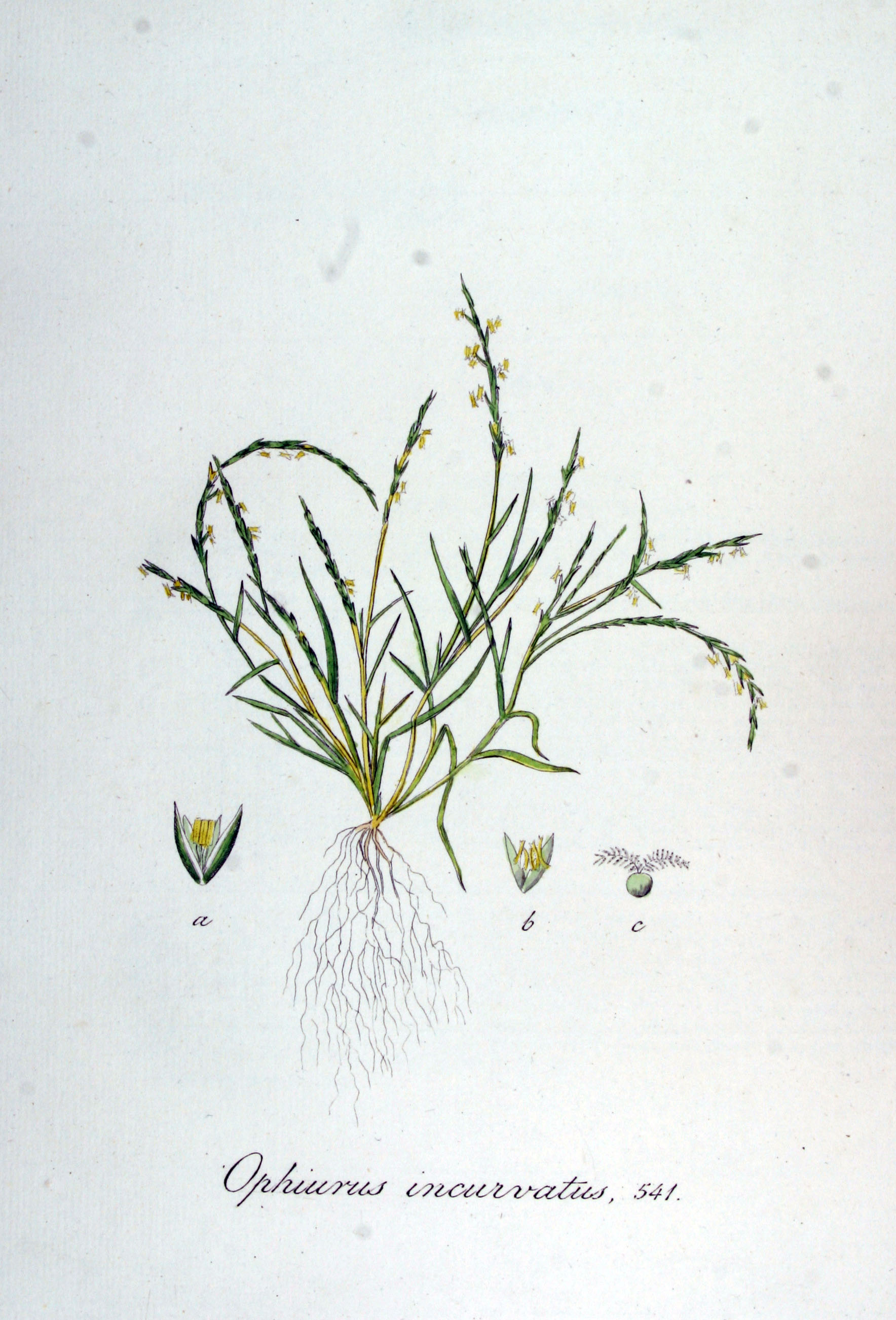 Parapholis incurva (L.) C.E. Hubbard (Syn. Ophiurus incurvatus Beauv.)